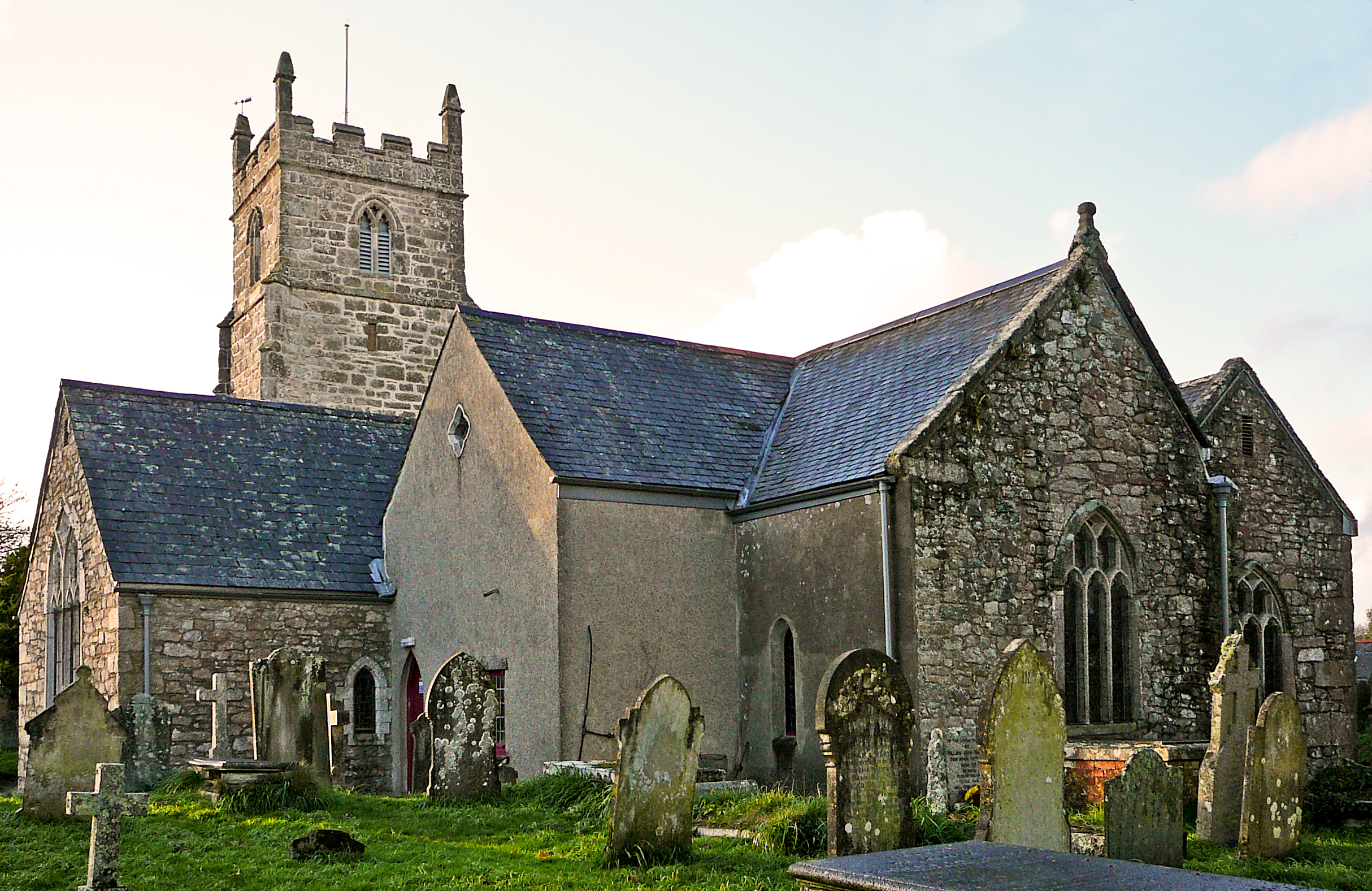 Budock Church 2